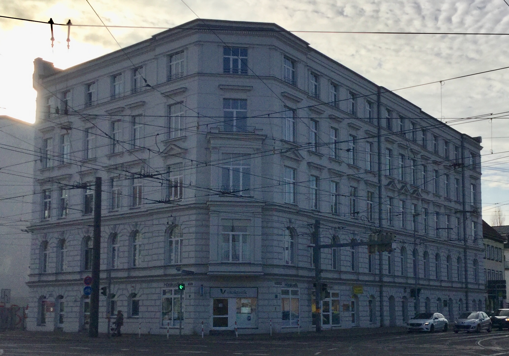 Große Diesdorfer Straße Ecke Westring